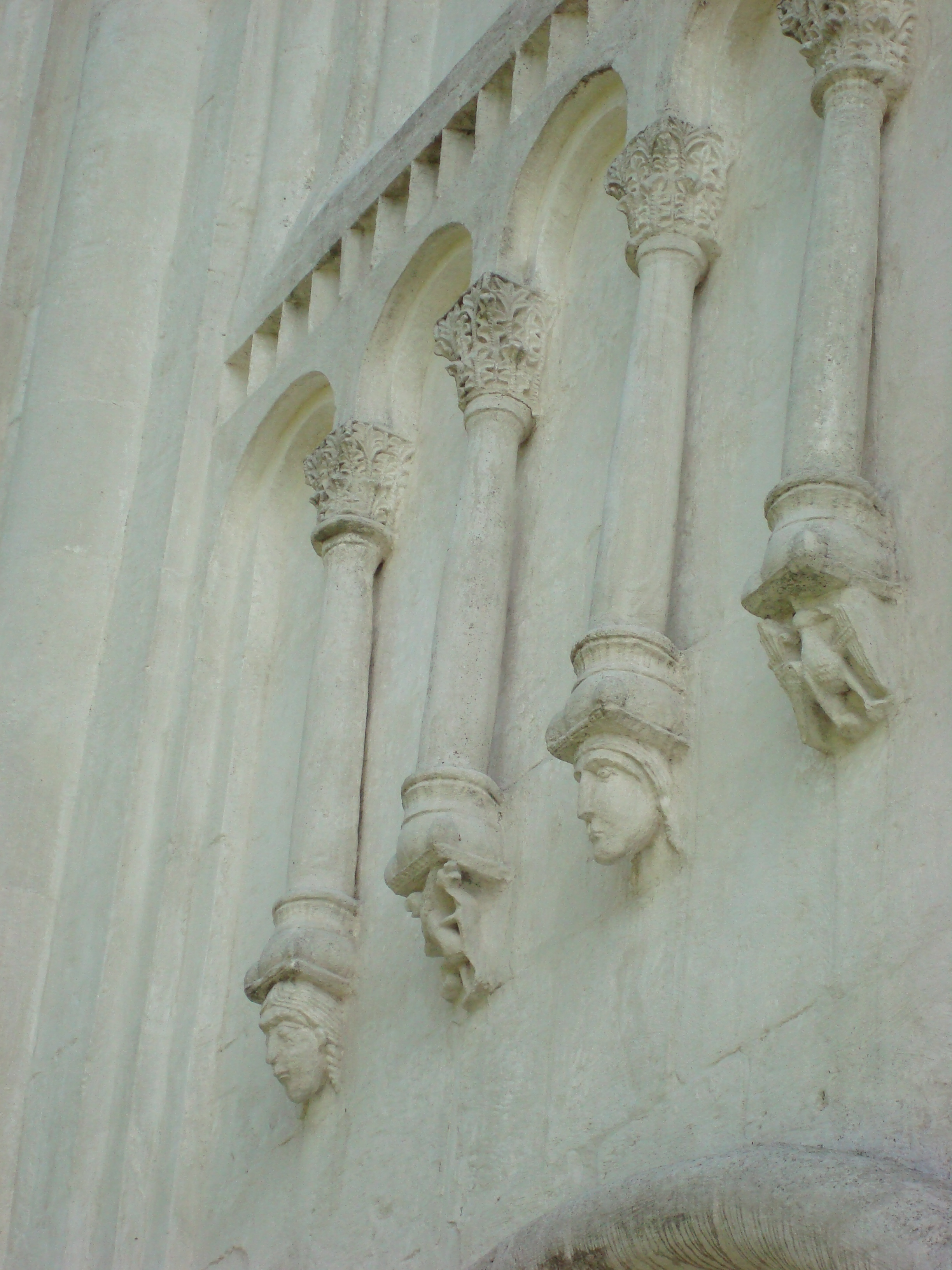 Церковь Покрова на Нерли: 1.5 км юго-восточнее поселка, правый берег реки Нерль, Боголюбово, Суздальский район, Владимирская область